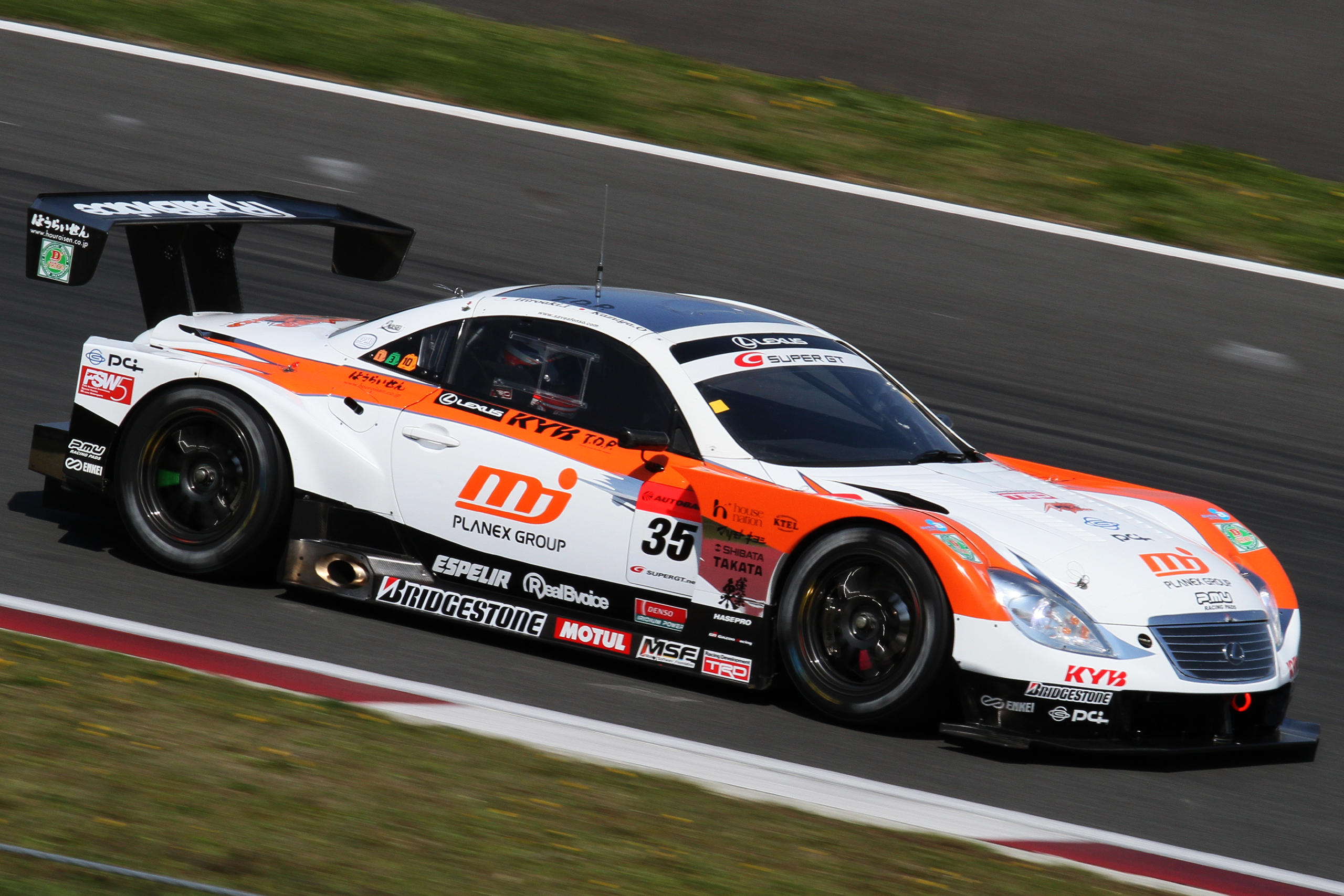 Super GT 2010 Rd.3 Fuji GT 400km: Kazuya Oshima (Lexus Team Kraft) driving the MJ Kraft SC430 during qualify session.